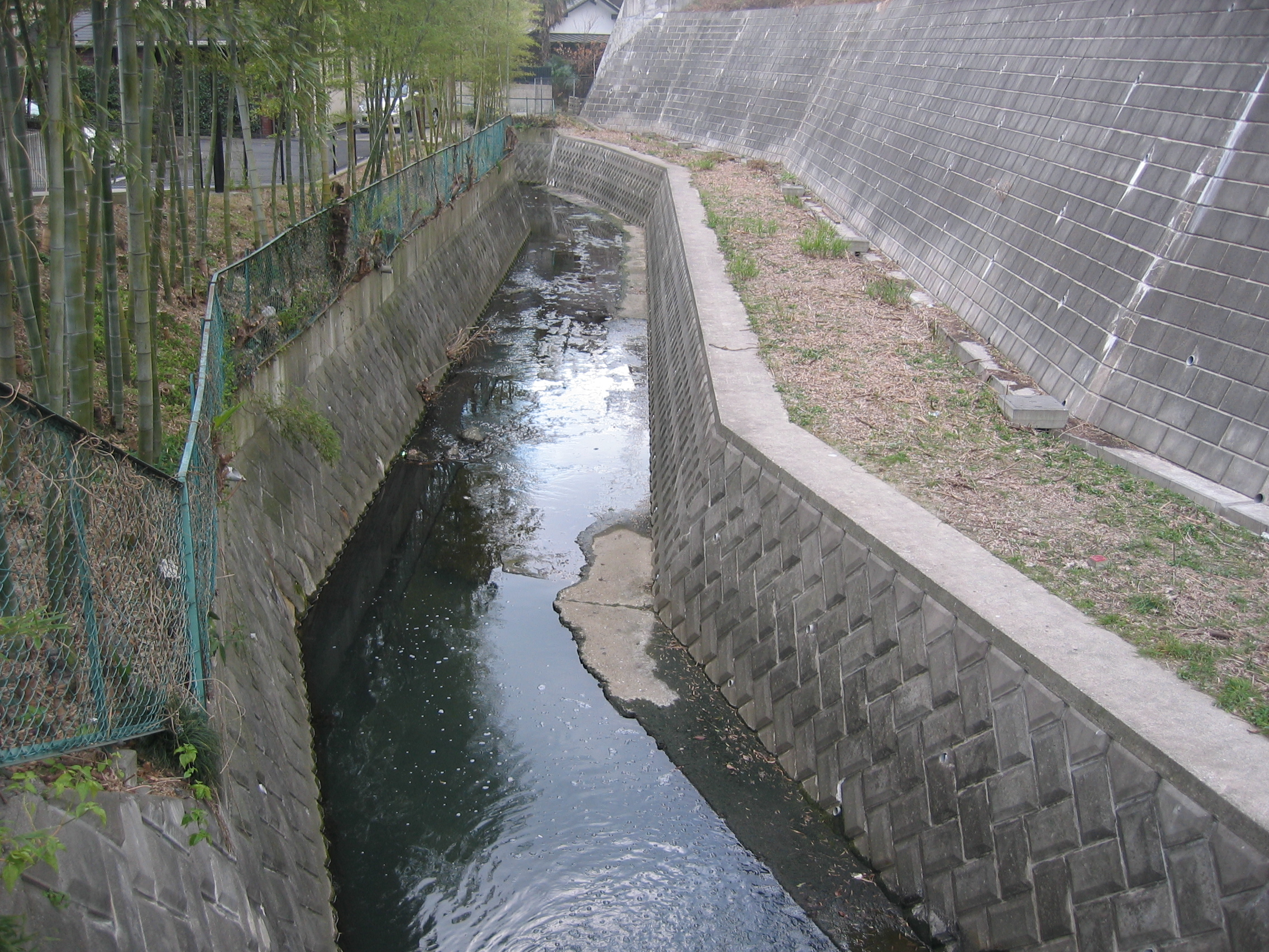 2004年12月28日、利用者自身の撮影。